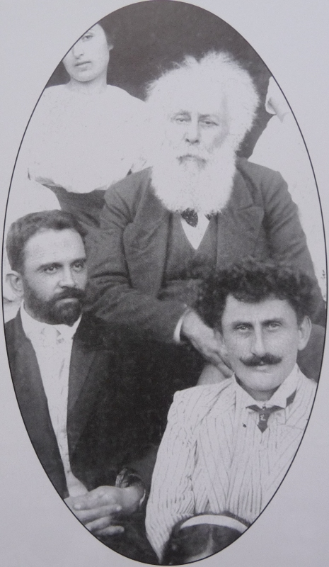 აკაკი ყვარელში. მარცხნივ იური ჭავჭავაძე, მარჯვნივ შალვა დადიანი. 1911 წლის 31 ივლისი.